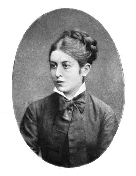 Vera Nikolaevna Figner